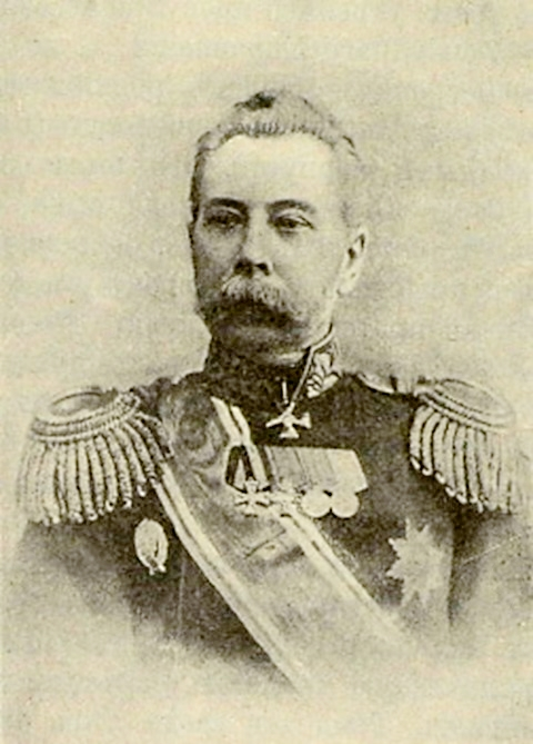 Павлов Владимир Петрович (1851—1906)